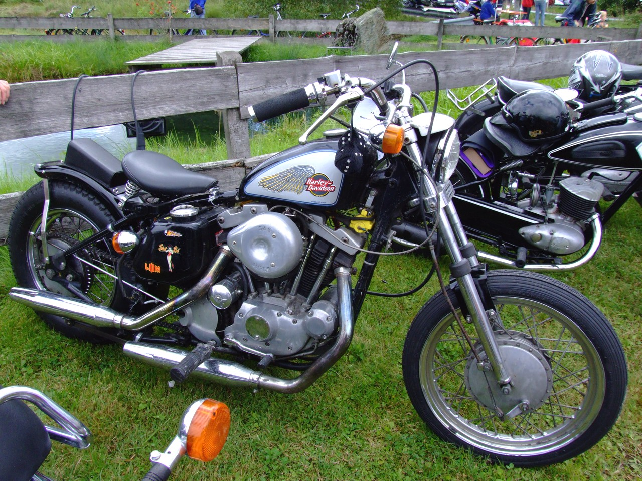 Quelle: selbst fotografiert, 08/2006 Fotograf: Späth Chr.